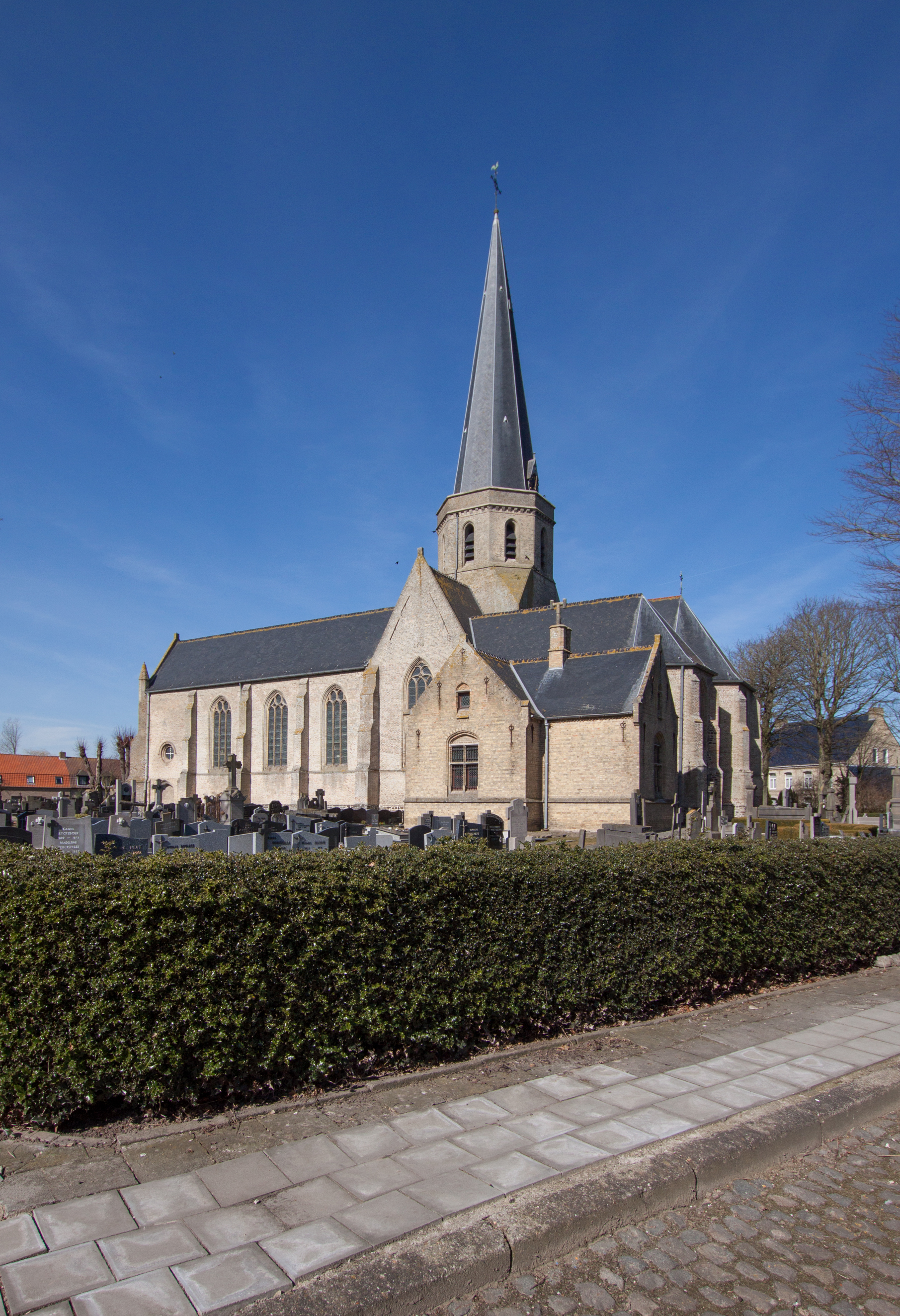 Leisele Churchyard